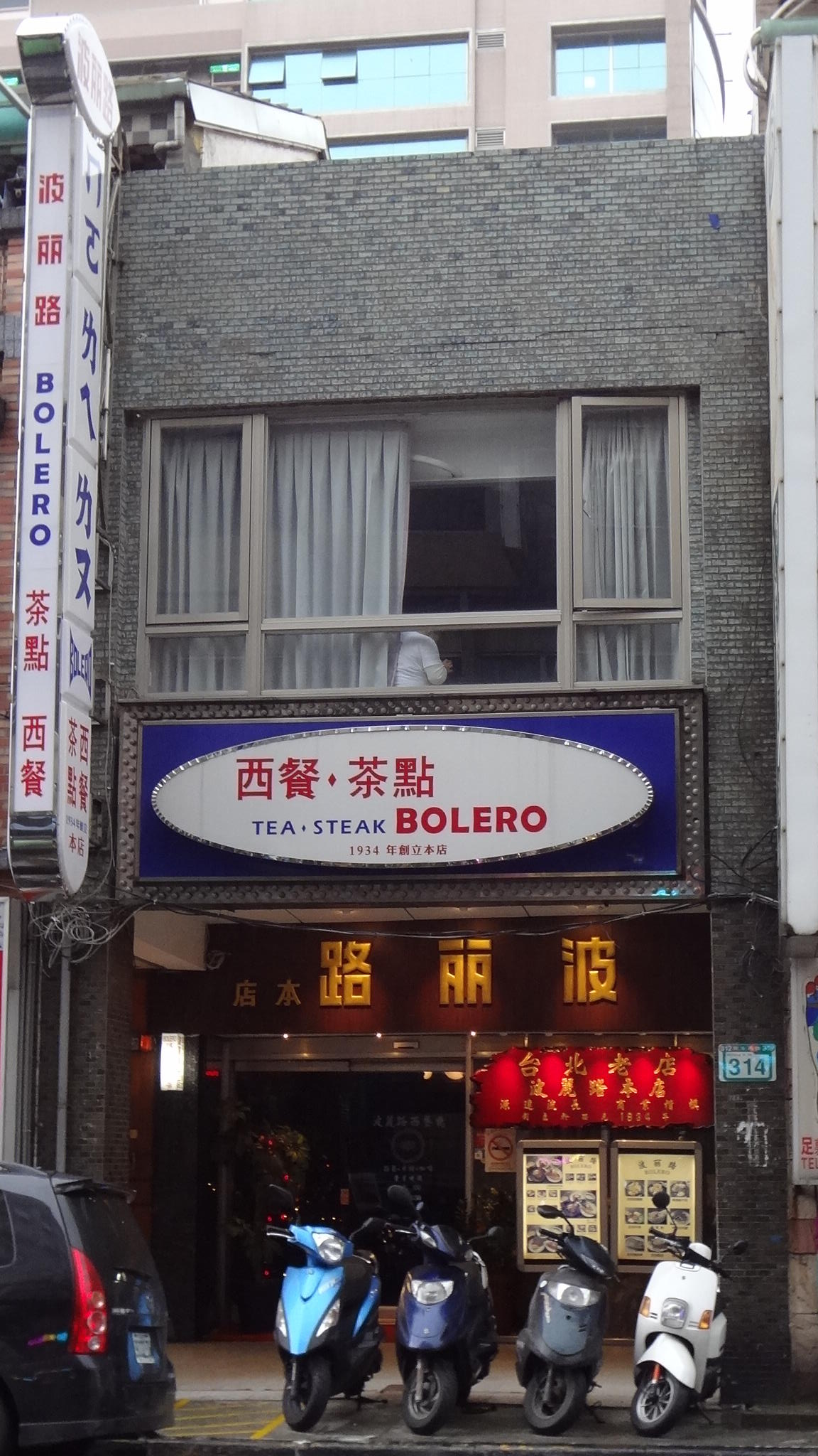 中文（台灣）: 波麗路餐廳本店，地址：臺北市大同區民生西路314號。